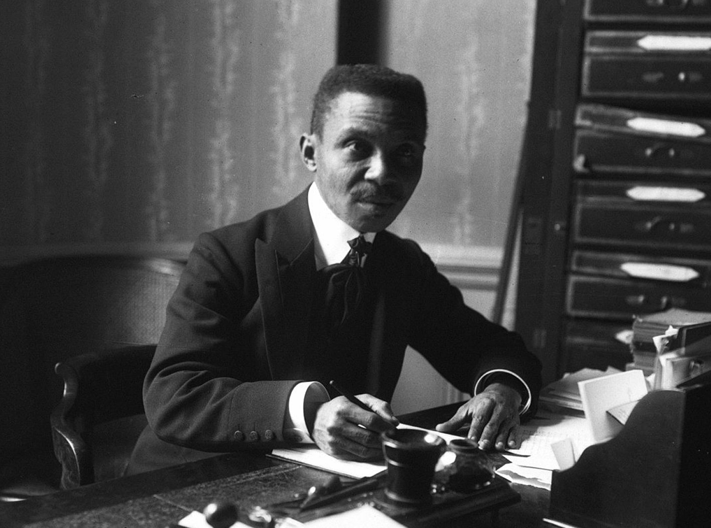 Georges Sylvain, envoyé extraordinaire et ministre plénipotentiaire, république d'Haïti